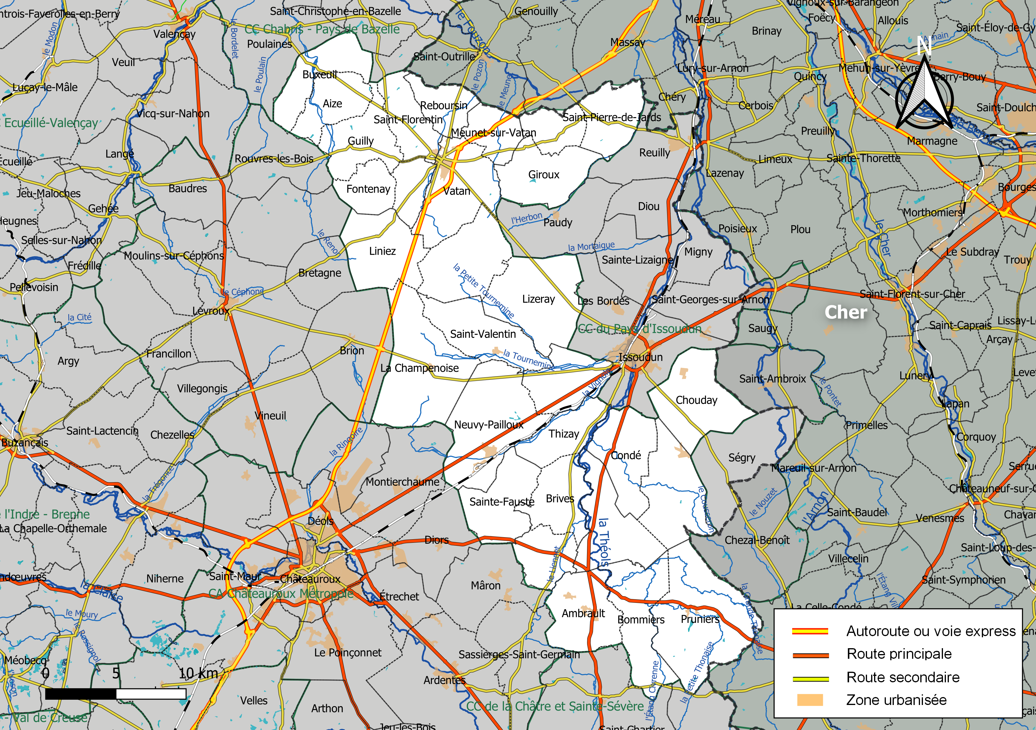 Carte de la communauté de communes Champagne Boischauts, département de l'Indre, France. Composition au 1er janvier 2019.